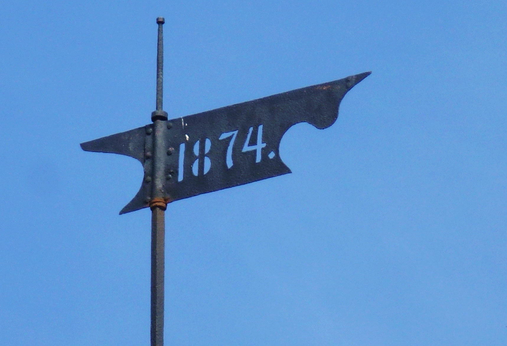 Nacka gård huvudbyggnad